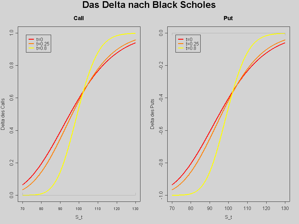 Das Delta für einen Put und einen Call nach Black Scholes zu verschiedenen Zeitpunkten